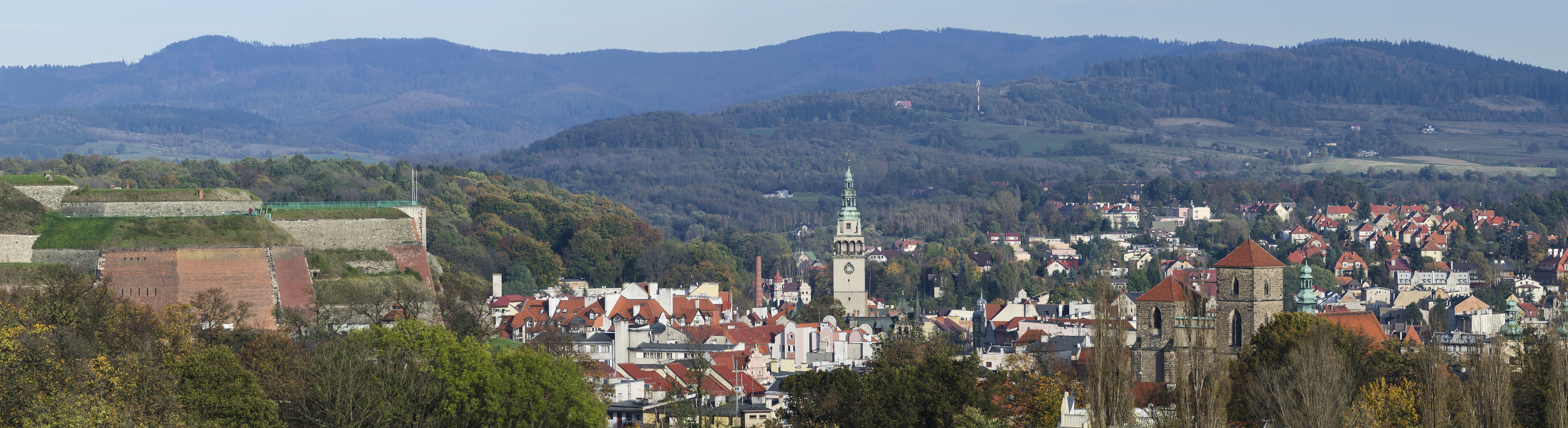 Kłodzko, historyczny układ urbanistyczny - ośrodek historyczny miasta Kłodzko z zachowanymi niekompletnie miejskimi murami obronnymi wraz ze średniowiecznym mostem i wyspą Piasek